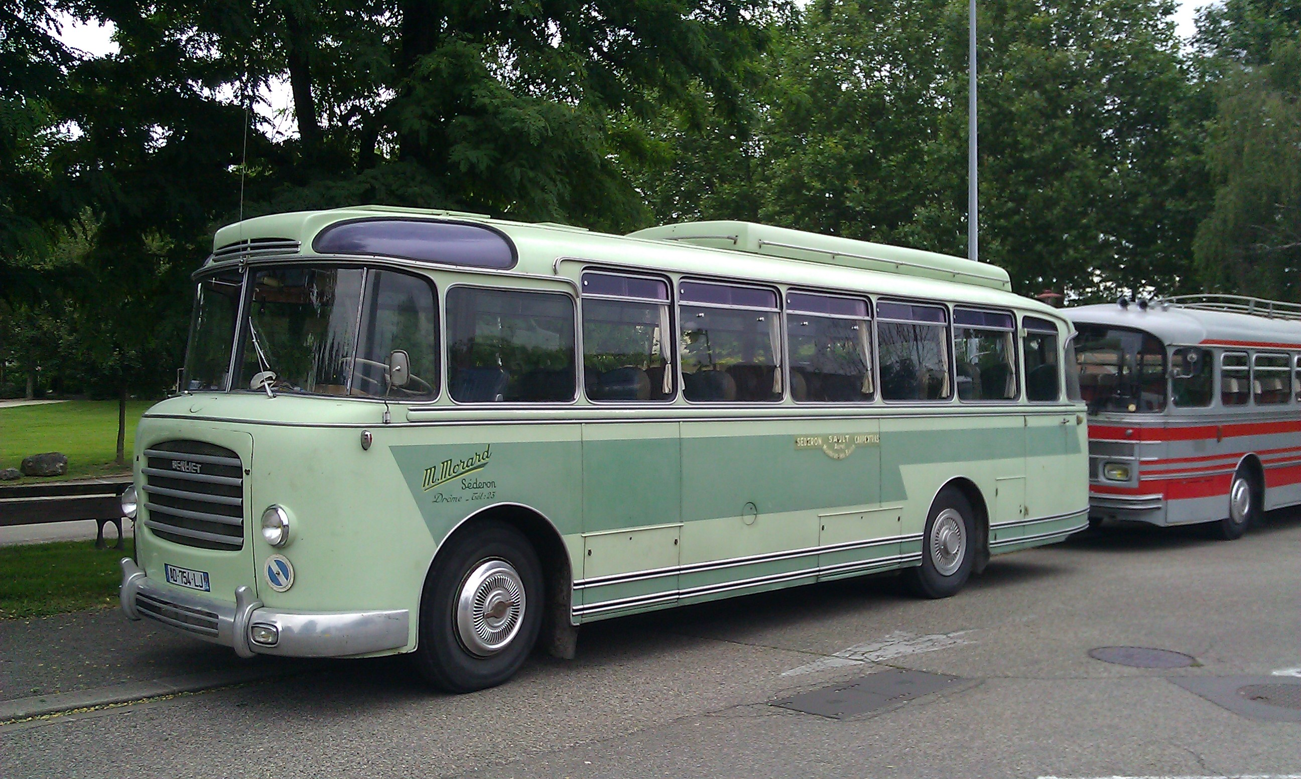 Bus Berliet PLB 8, carrosserie Gangloff (Colmar)